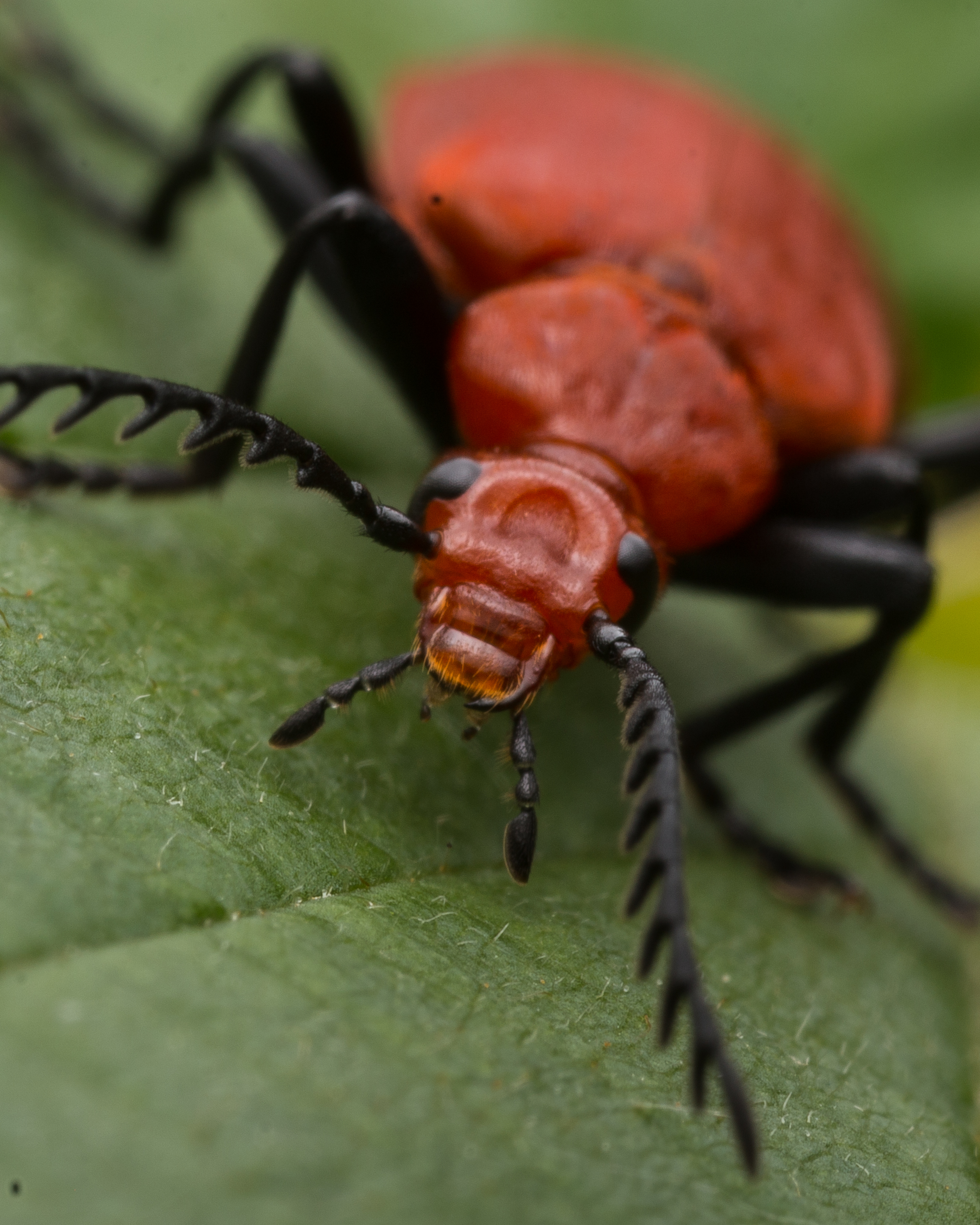 Ein Rotköpfiger Feuerkäfer (Pyrochroa serraticornis) auf einem grünen Blatt